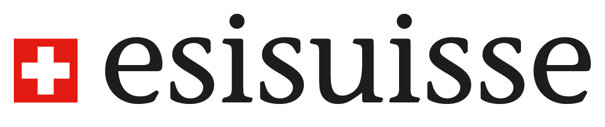 esisuisse-Logo